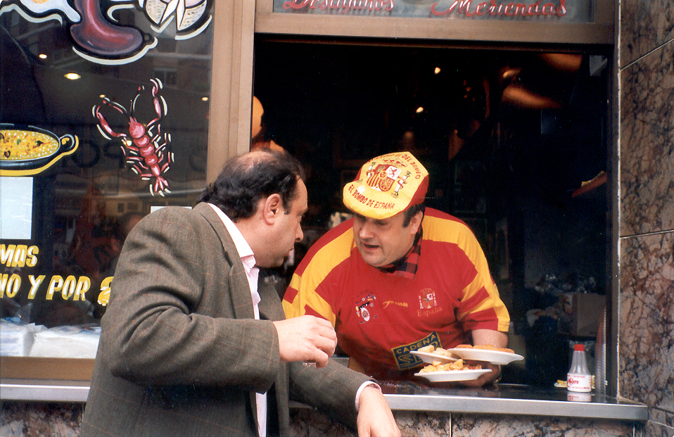 Manolo el del bombo, conegut aficionat a la selcció espanyola de futbol, al seu bar.